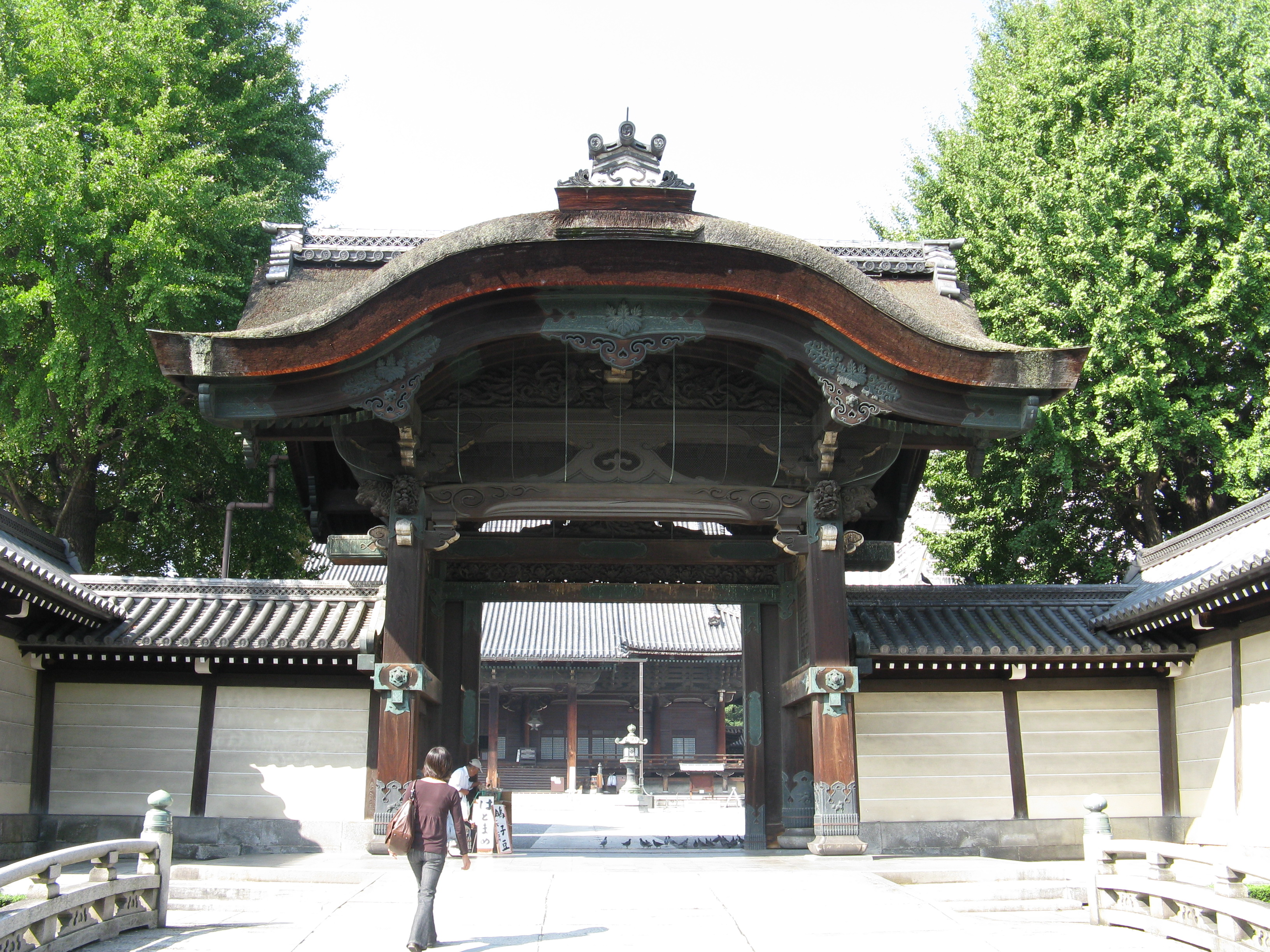 東本願寺 阿弥陀堂門